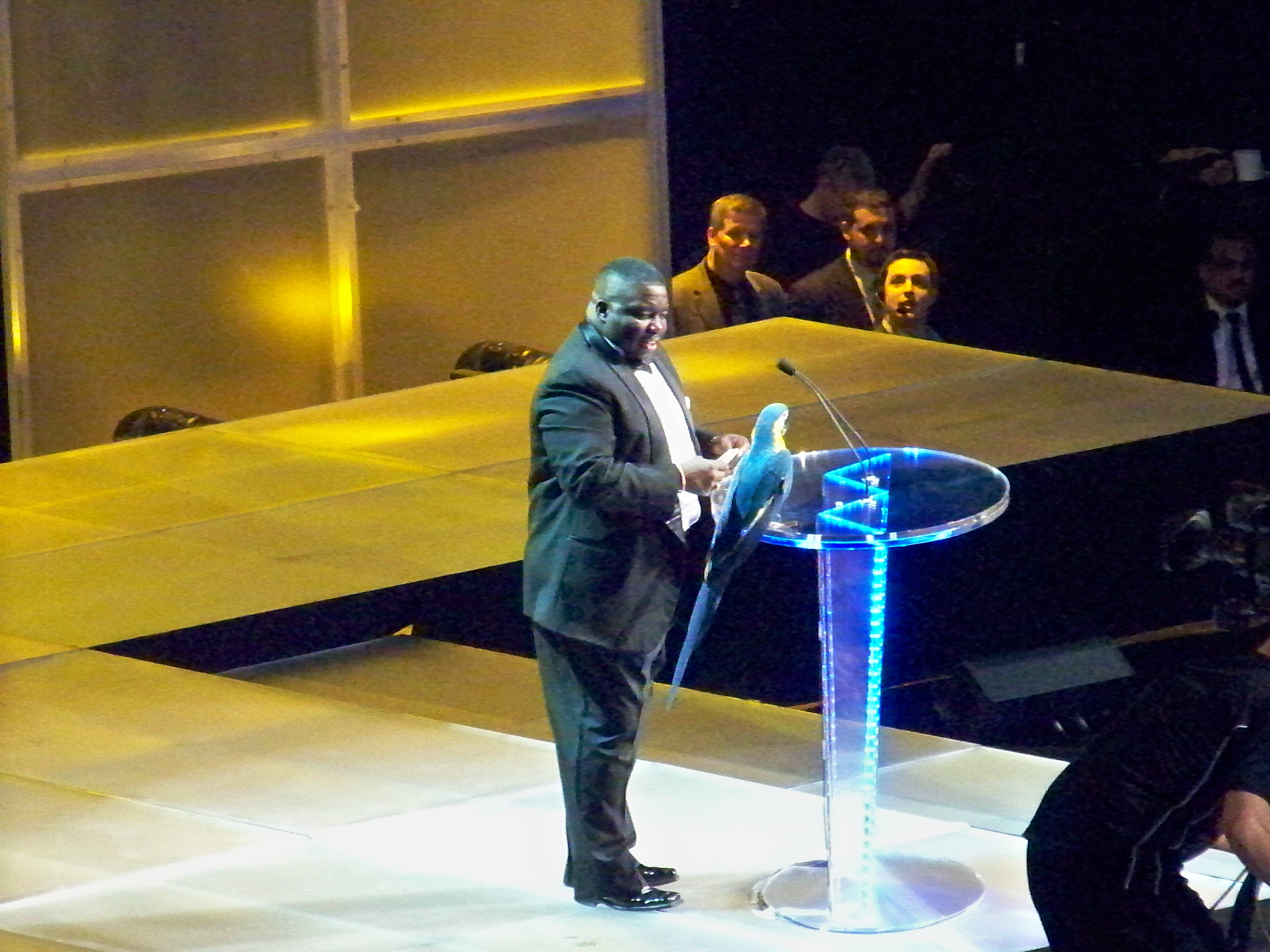 Aussi en plein forme